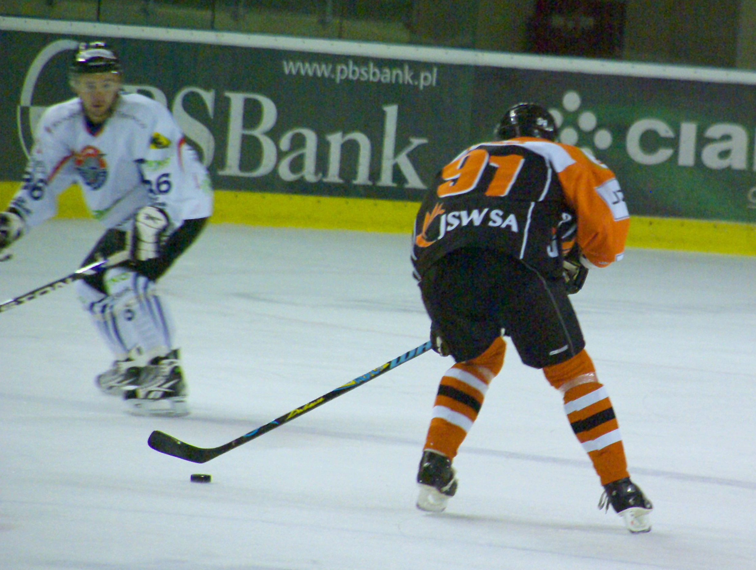 Mecz KH Sanok - JKH GKS Jastrzębie (3:2 k.) 19 września 2010, Arena Sanok. Tobiasz Bigos, Richard Král.